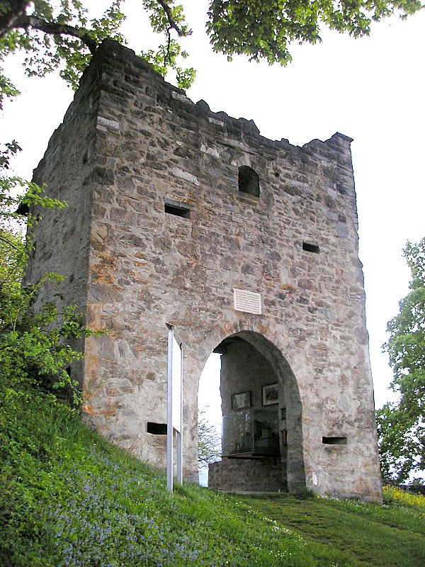 Burg Werdenstein bei Immenstadt im Allgäu (Landkreis Oberallgäu, Bayerisch-Schwaben). Das Burgtor von Westen. Eigene Aufnahme, Mai 2008 / Werdenstein castle near Immenstadt im Allgäu (Landkreis Oberallgäu, Bavaria, Germany). The gate from the west. Own photo, May 2008